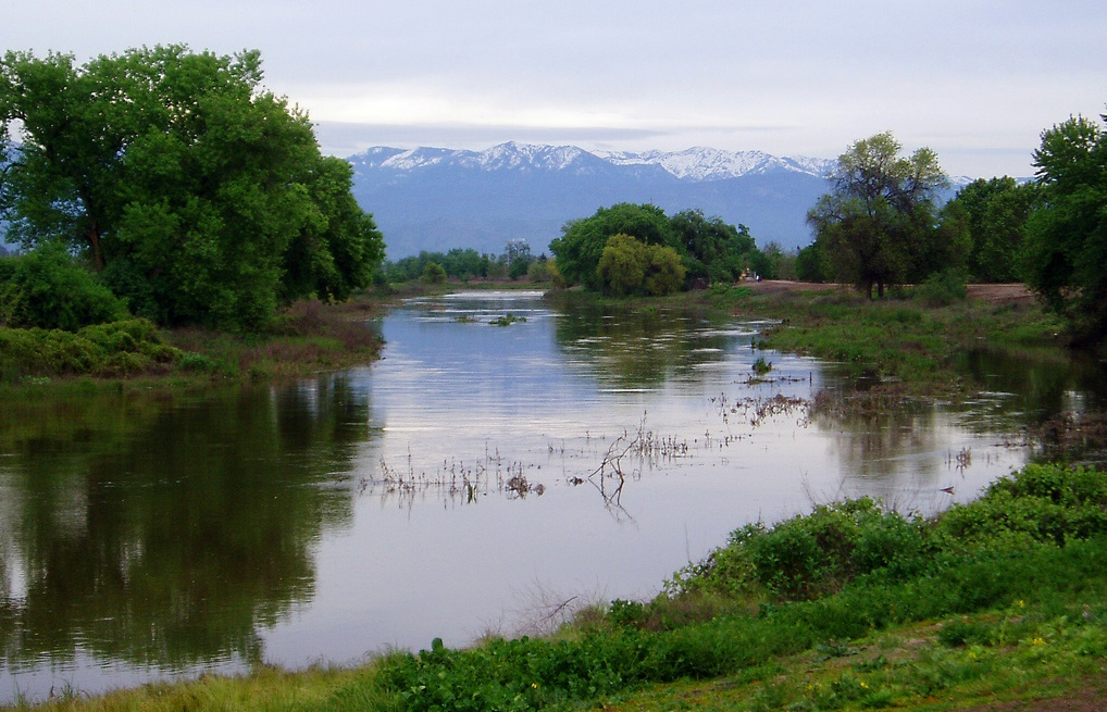 St. Johns River Visalia